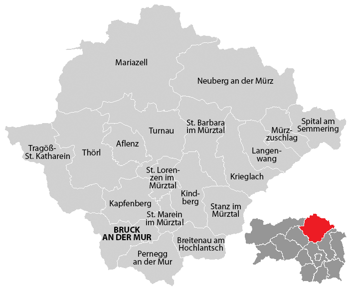 Gemeinden im Bezirk Bruck-Mürzzuschlag (Steiermark), Stand: 1. Januar 2015